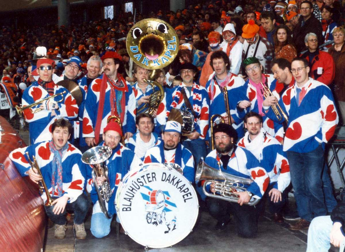 De Blauhúster Dakkapel in de schaatstempel Thialf in Heerenveen, tijdens de WK-allround in 1990.